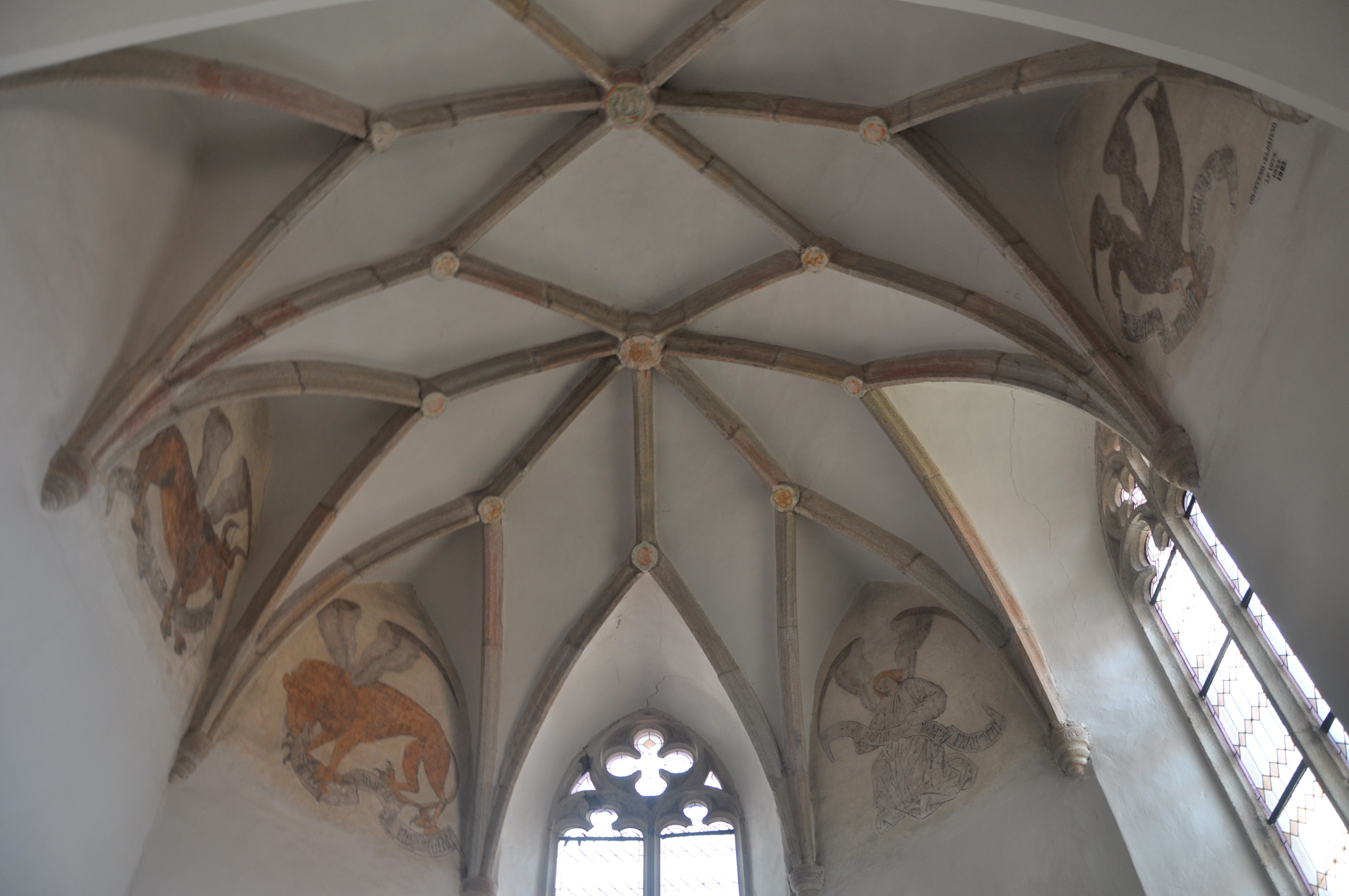 Žebrová hvězdicová klenba v presbytáři v kostele sv. Ducha v Telči